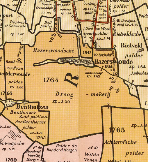 Hazerswoudse_Droogmakerij